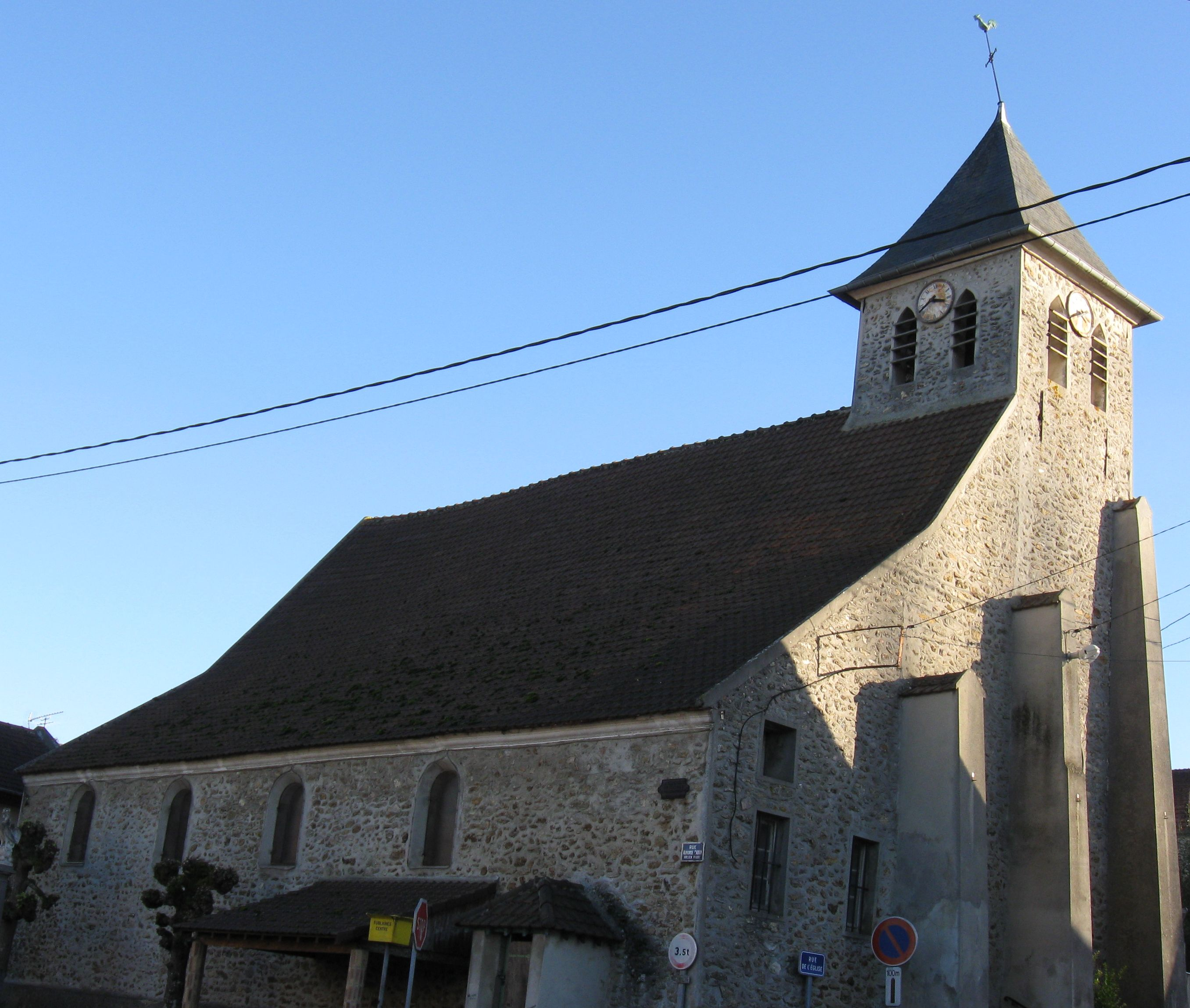 Église Saint-Éloi de Fublaines. (Seine-et-Marne, région Île-de-France).